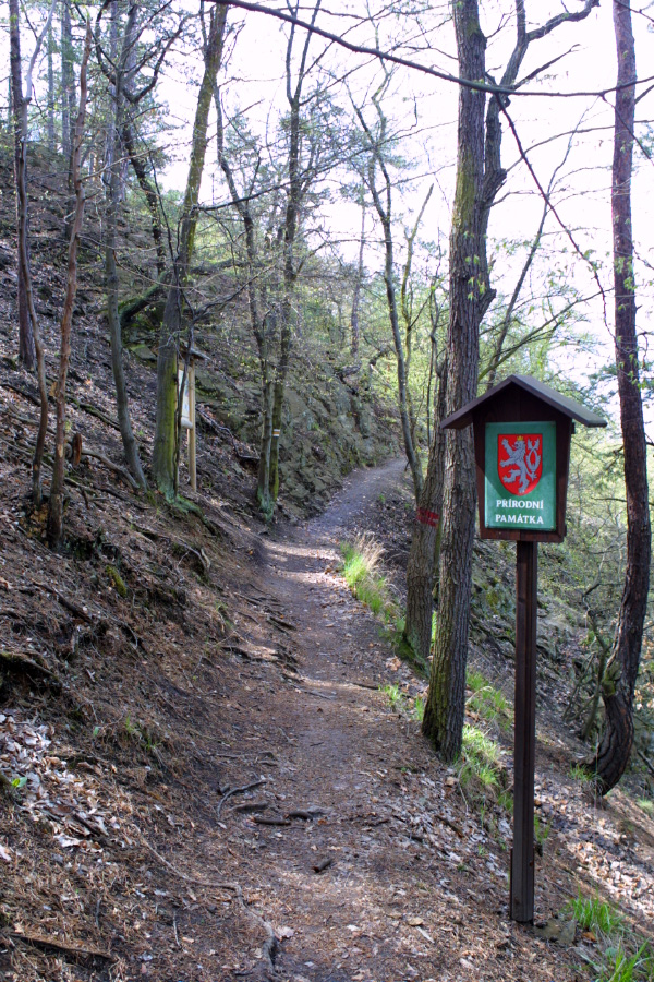 Turistická cesta na severním okraji chráněného území Malochova skalka. (30. duben 2006)